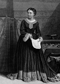 Laura Addison (née Wilmshurst)